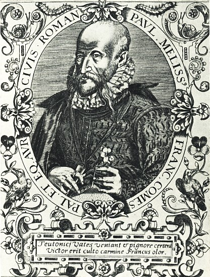 Der gekrönte Dichter Paul Scheede-Melissus auf einem Stich von Th. de Bry.